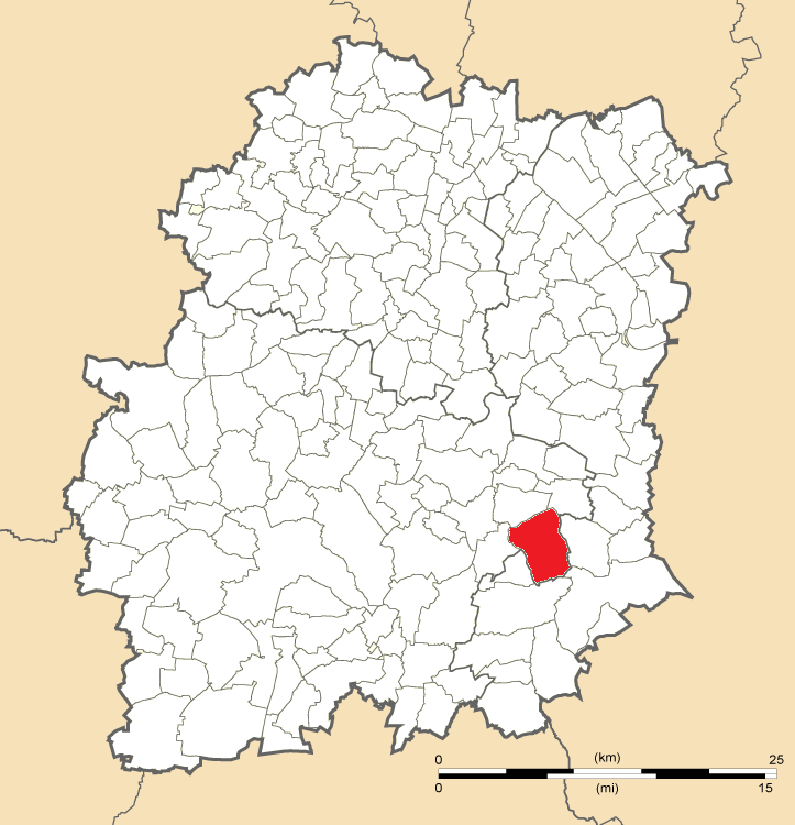 Carte de positio de Boutigny-sur-Essonne en Essonne (91)